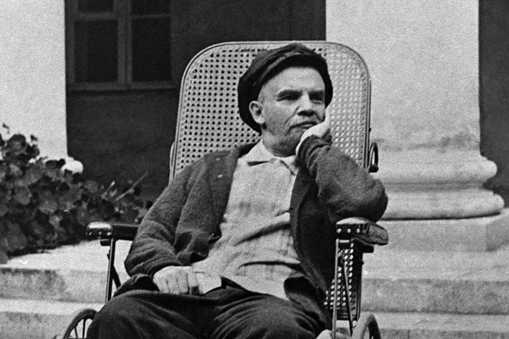 Ленин в Горках. 1923 год. Одна из последних прижизненных фотографий В.И. Ленина